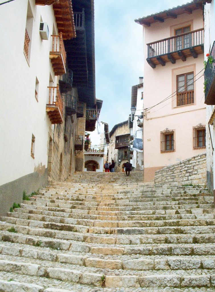 Com molts pobles de la comarca, Pena-roja de Tastavins està localitzat en un pendent. El poble conserva un gran nombre de cases amb balcó de fusta i alguns edificis significatius, com un ajuntament on es pot visitar el calabós que tenia, que és francament estret. Modernament, s'hi ha construït un museu de caire paleontològic, ja que al terme s'hi troben jaciments amb fòssils de dinosaure. Concretament conserven el que podria ser el més gran dinosaure trobat mai en sediments marins de tot el món.